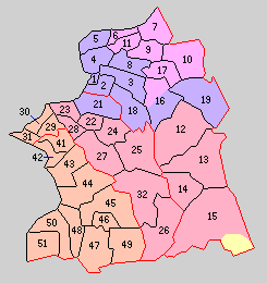 千葉県君津郡の町村。